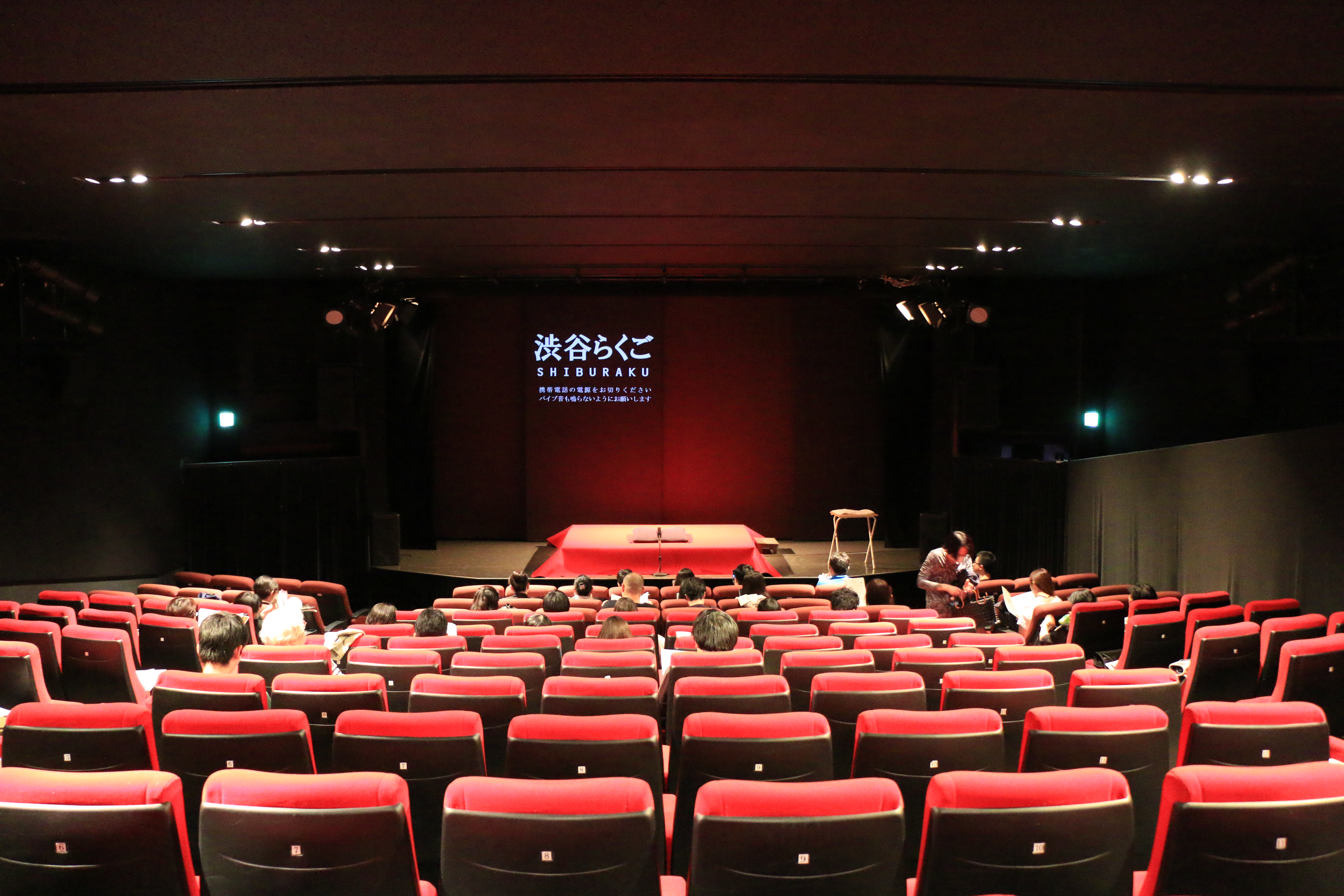 ユーロライブで行われる渋谷らくごの会場